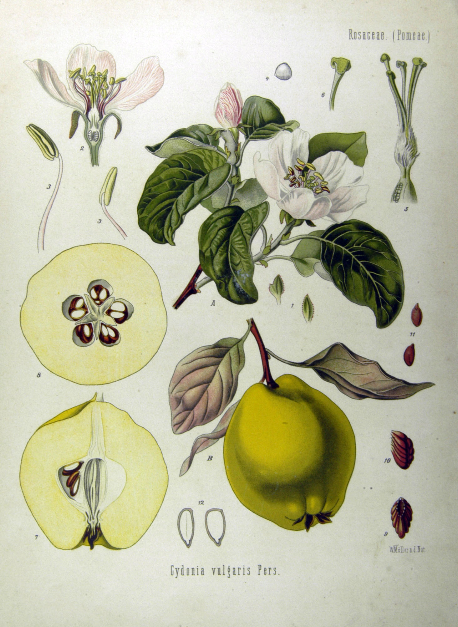 Quitte. A blühender Zweig, natürl. Grösse; B Frucht, desgl.; 1 Nebenblättchen, desgl.; 2 Blüthe im Längsschnitt, vergrössert; 3 Staubgefässe, desgl.; 4 Pollen, desgl.; 5 Stempel, desgl.; 6 Griffel mit Narbe, desgl.; 7 Frucht im Längsschnitt, desgl.; 8 dieselbe im Querschnitt, desgl.; 9 u. 10 Samenballen eines Faches, natürl. Grösse; 11 einzelne Samen, desgl.; 12 derselbe zerschnitten, vergrössert.